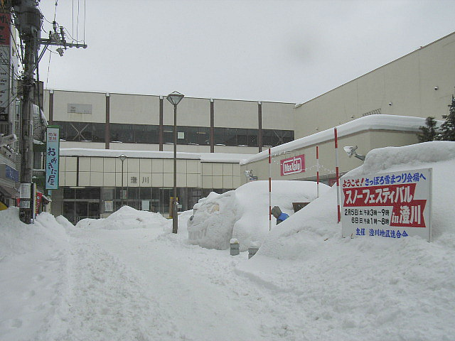 Sumikawa Station, Sapporo Subway, Japan.